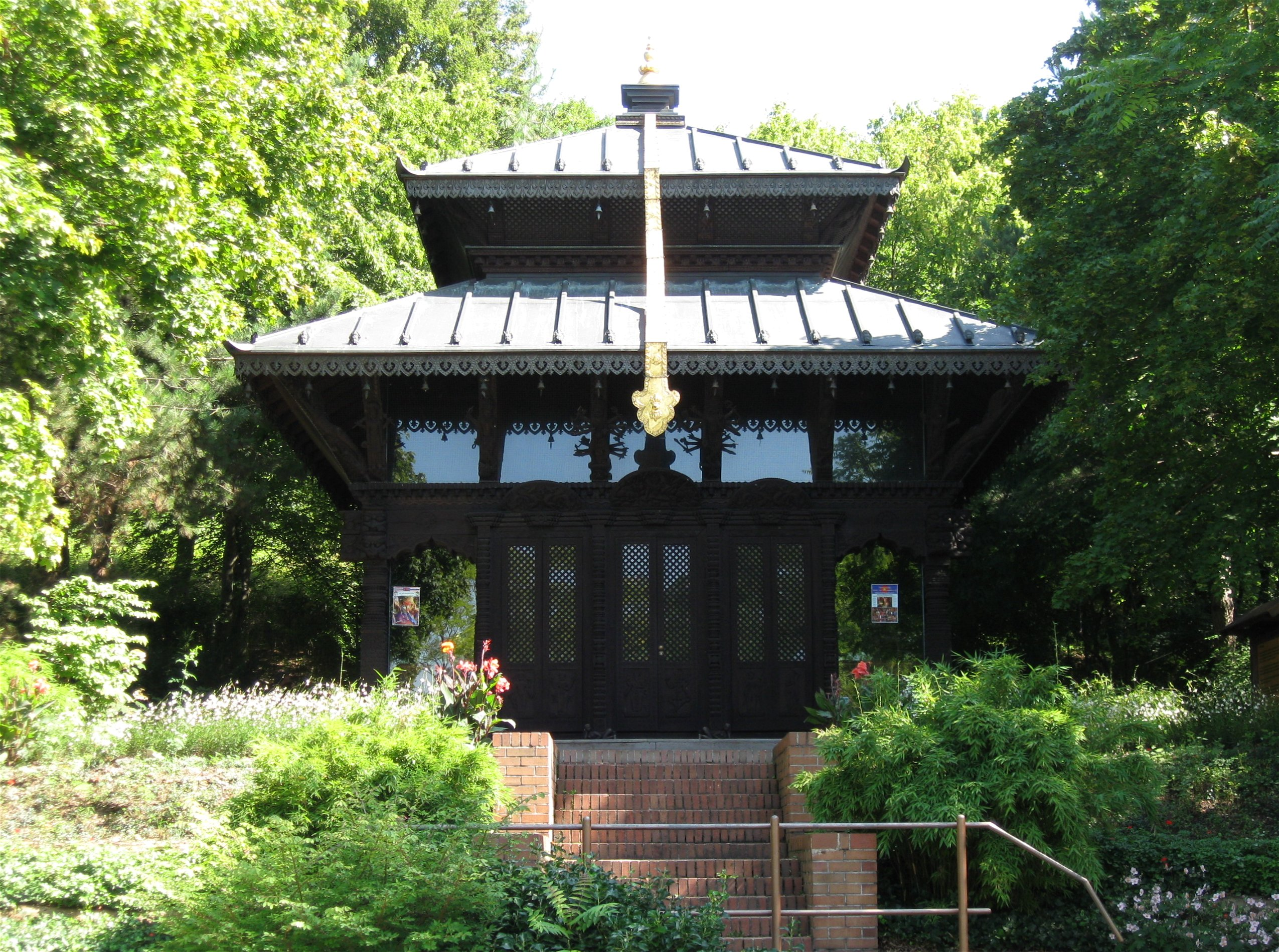 Eine Pagode, die unter der Leitung von Architekt Jochen Reier von 200 Handwerkern in über einjähriger Arbeit in Nepal geschnitzt wurde. Westpark, München